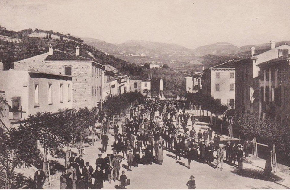 Negrar (provincia di Verona) in una foto d'epoca